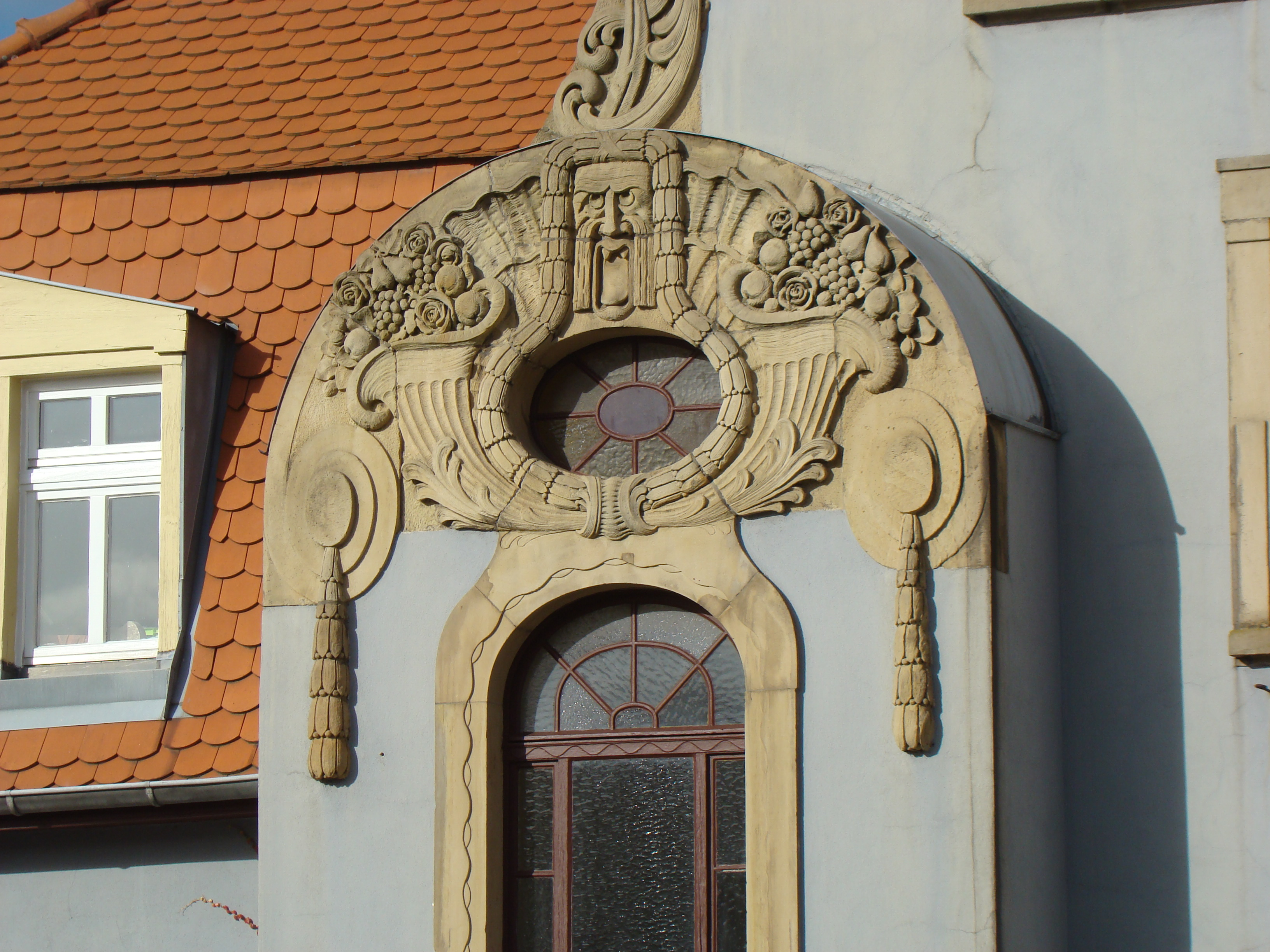 Wohnhaus des Bildhauers Conrad Keller (heute Jugendzentrum) in Wiesloch, Giebeldetail